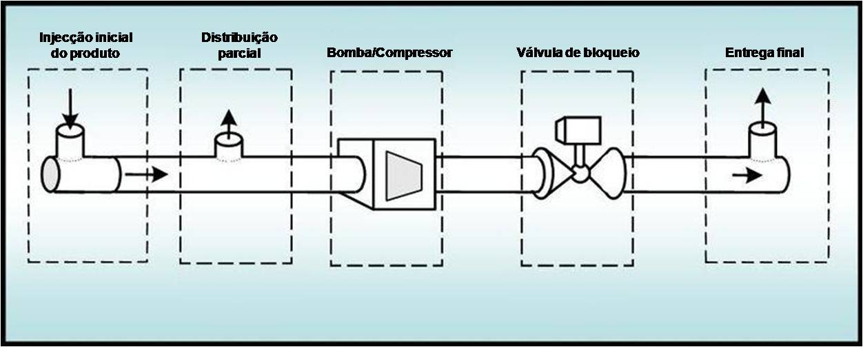 Componentes de um pipeline